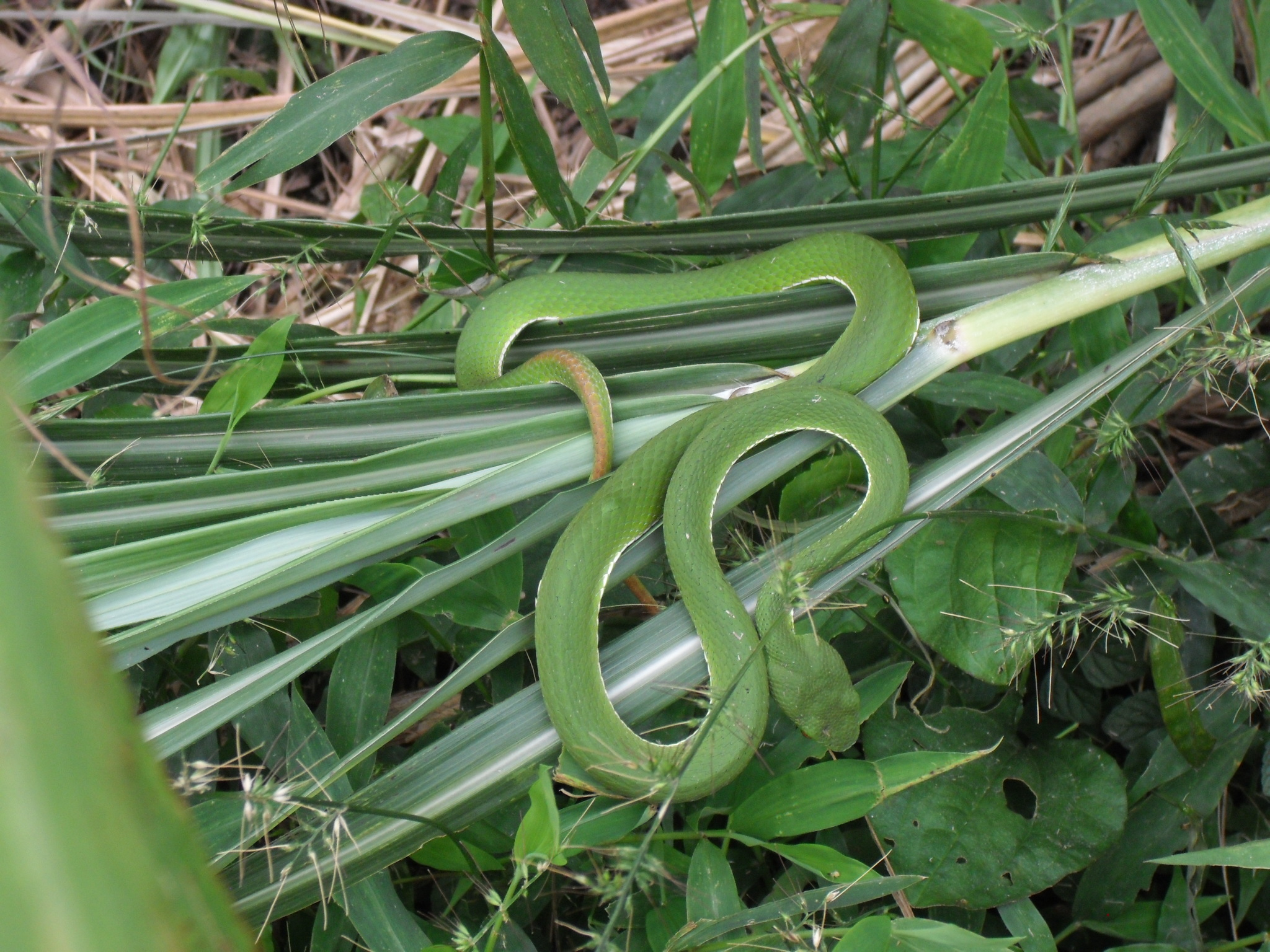 Bân-lâm-gú: 赤尾呆（赤尾鮐），學名：Trimeresurus stejnegeri stejnegeri，佇陽明山國家公園大屯山南爿的山崎翕的。